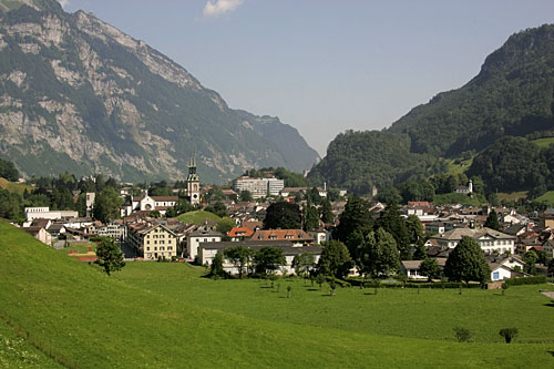 Die kleinste Hauptstadt der Schweiz: Glarus